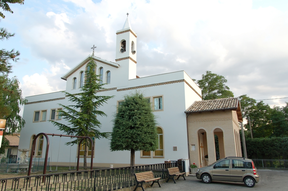 Pescara 2011